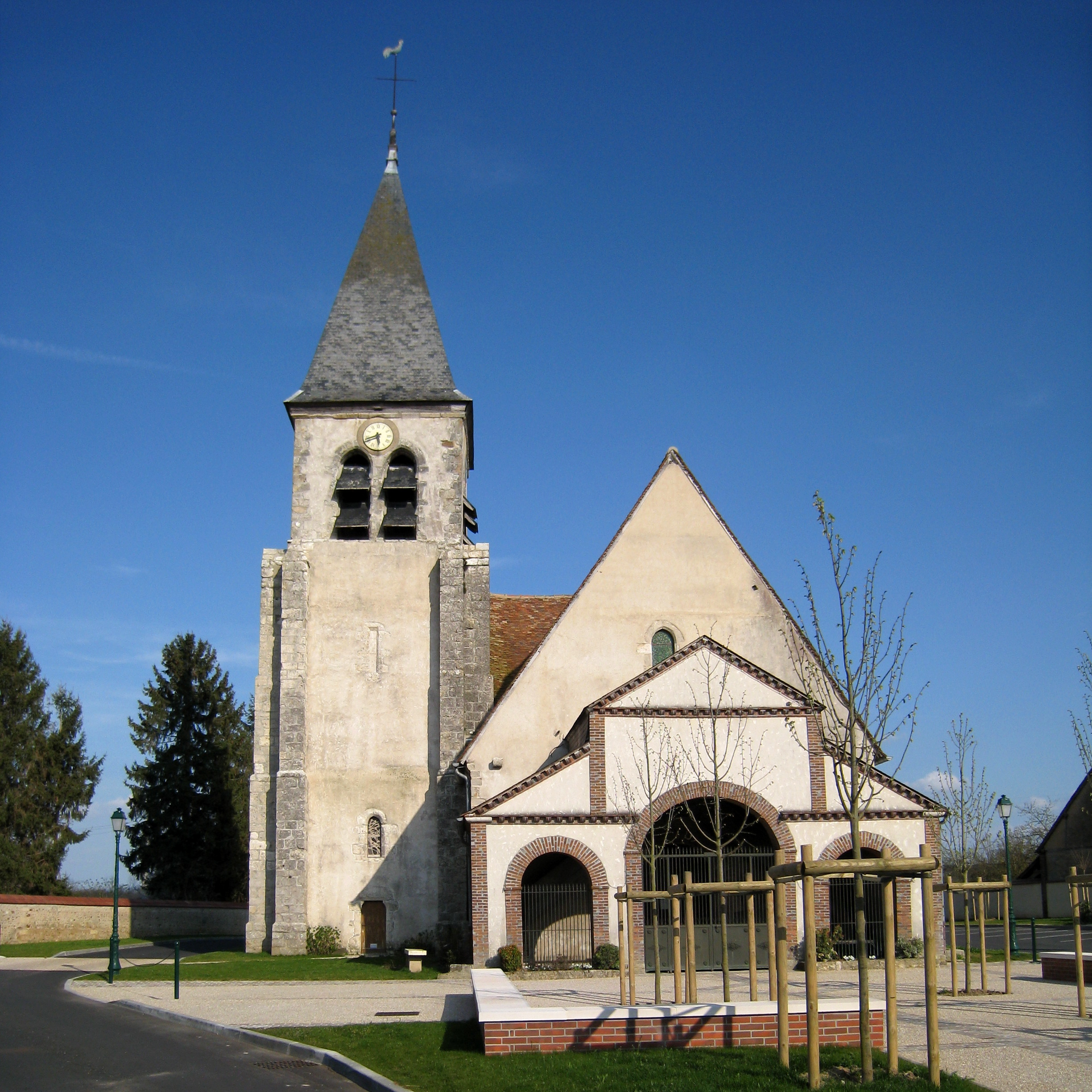 Eglise Saint-Étienne de Chuelles, dans le Loiret (France)